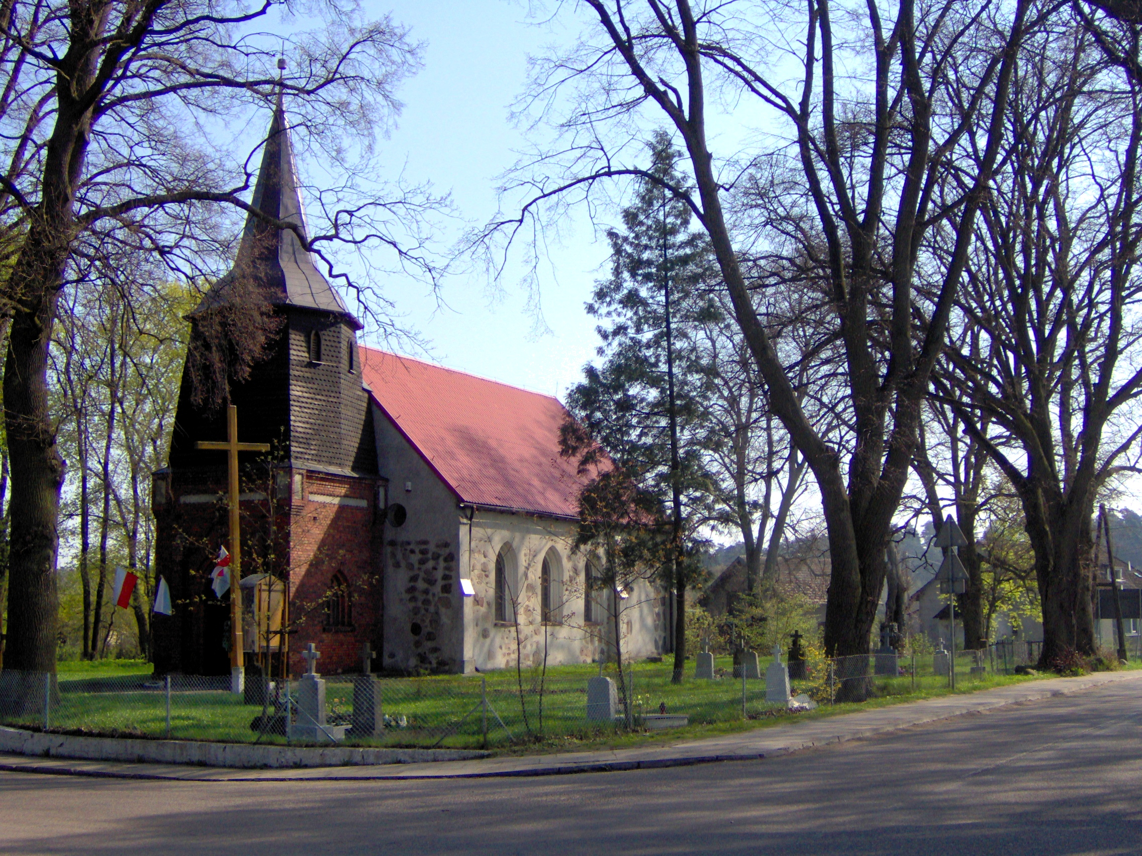 Kościół w Mostach (woj. zachodniopomorskie), zabytek nr rejest. 365